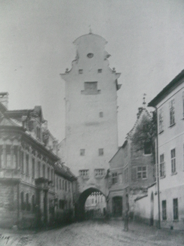 Das Frauentor